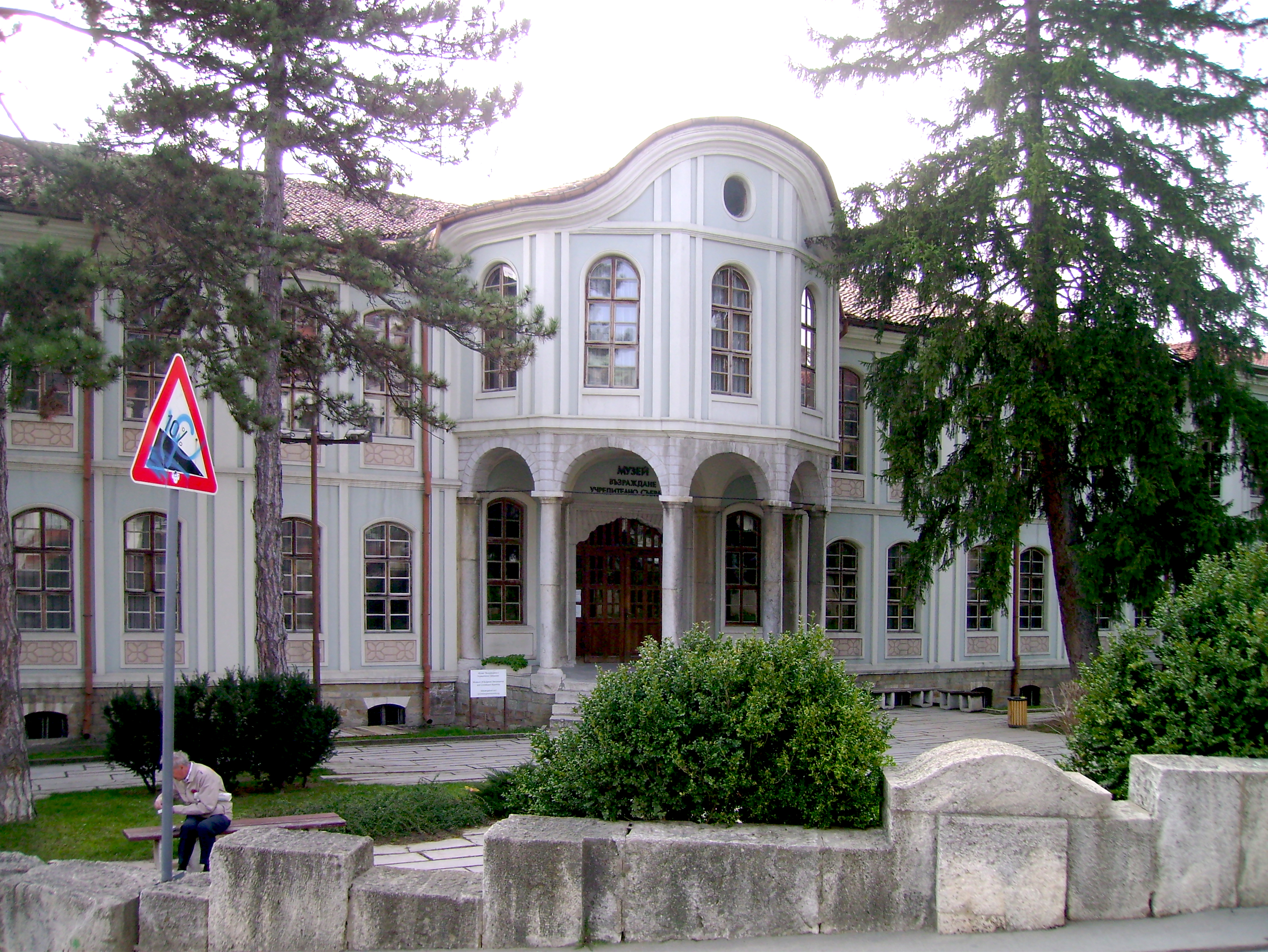 Veliko Tarnovo, Bulgaria